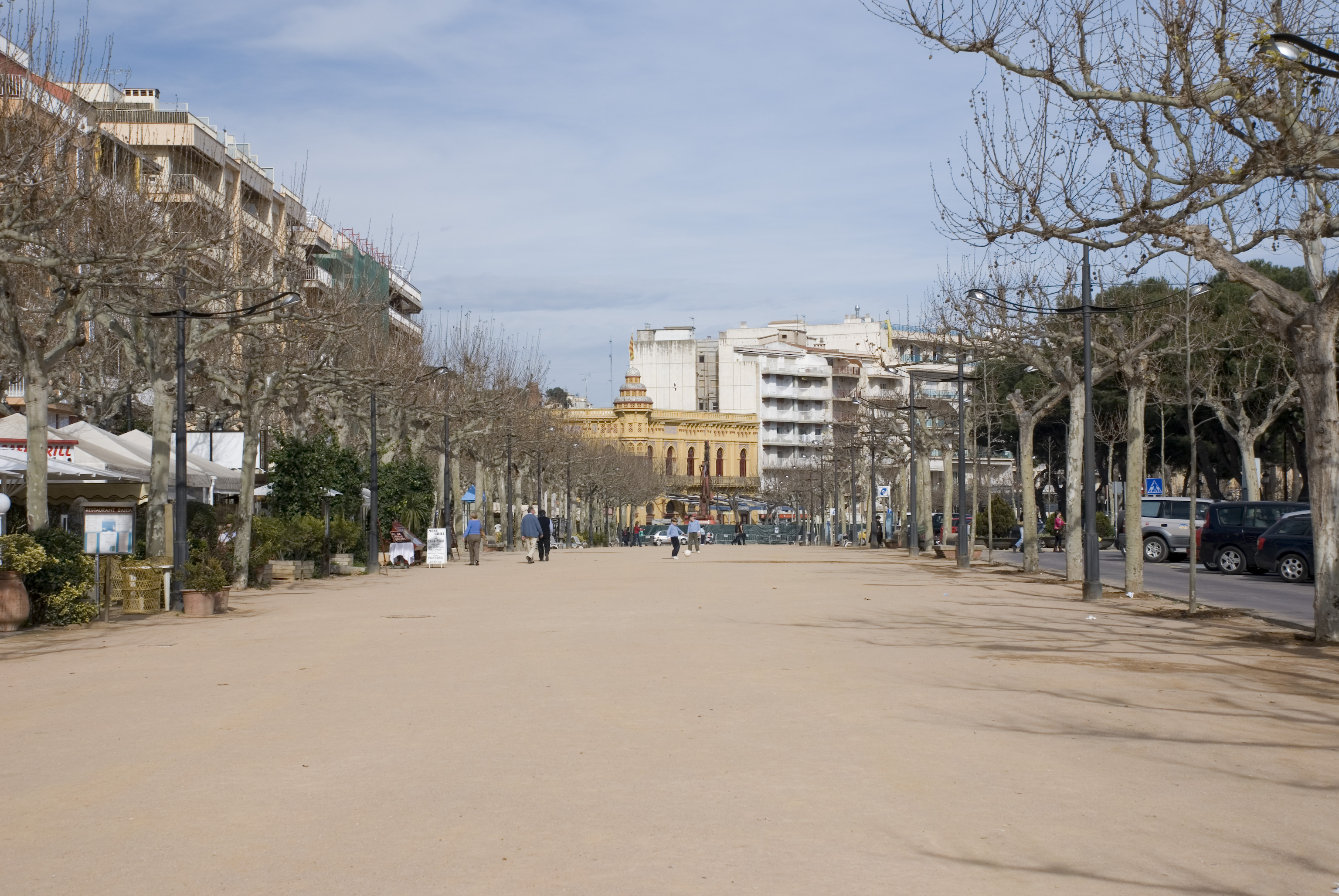 Passeig dels Guíxols de Sant Feliu de Guíxols Camera data Camera Nikon D80 Lens Nikon AF-S DX 18-135 mm Focal length 44 mm Aperture f/8 Exposure time 250 s Sensivity ISO 100